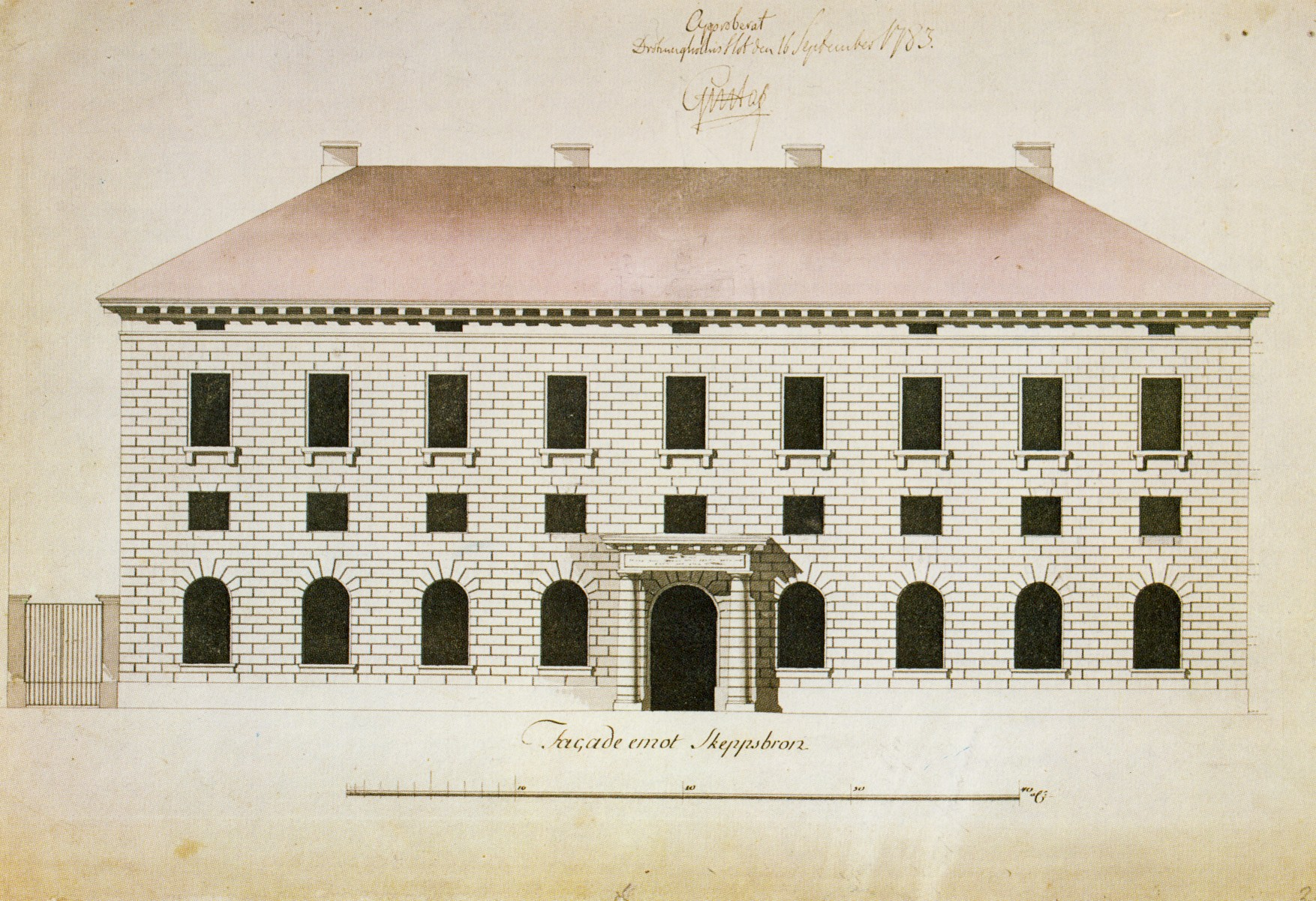 Fasadritning till "Tullpackhuset" vid Skeppsbron i Stockholm